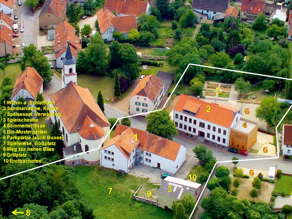 Gersheim: Spohns Haus (Luftbild mit Legende)